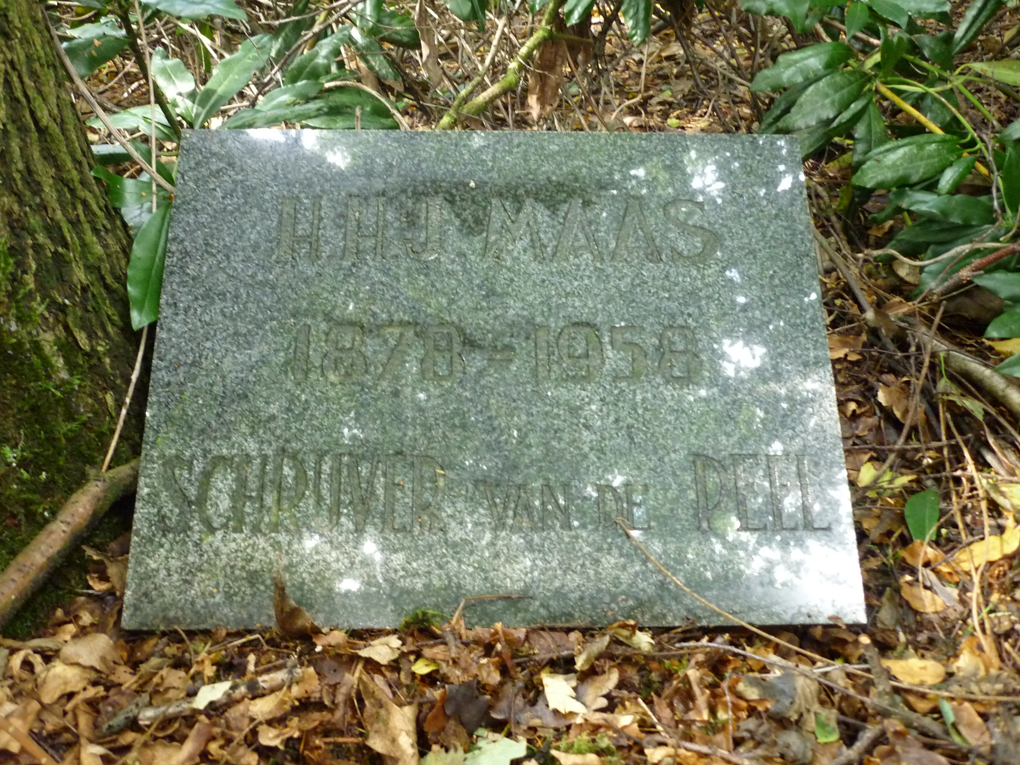 Gedenksteen bij de Herman Maasboom, een eik die in 1976 door zijn vrienden geplant werd nabij de Grotenberg op Venrays grondgebied ter ere van Herman Maas en als stil protest tegen de gemeente Deurne dat deze schrijver daar geen straatnaam kreeg.